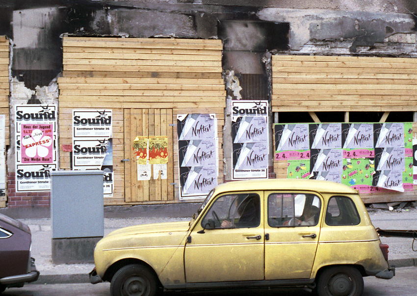 Posters in the streets of Berlin, Hauptstraße, Berlin-Schöneberg Plakate in den Straßen von Berlin, Hauptstraße, Berlin-Schöneberg